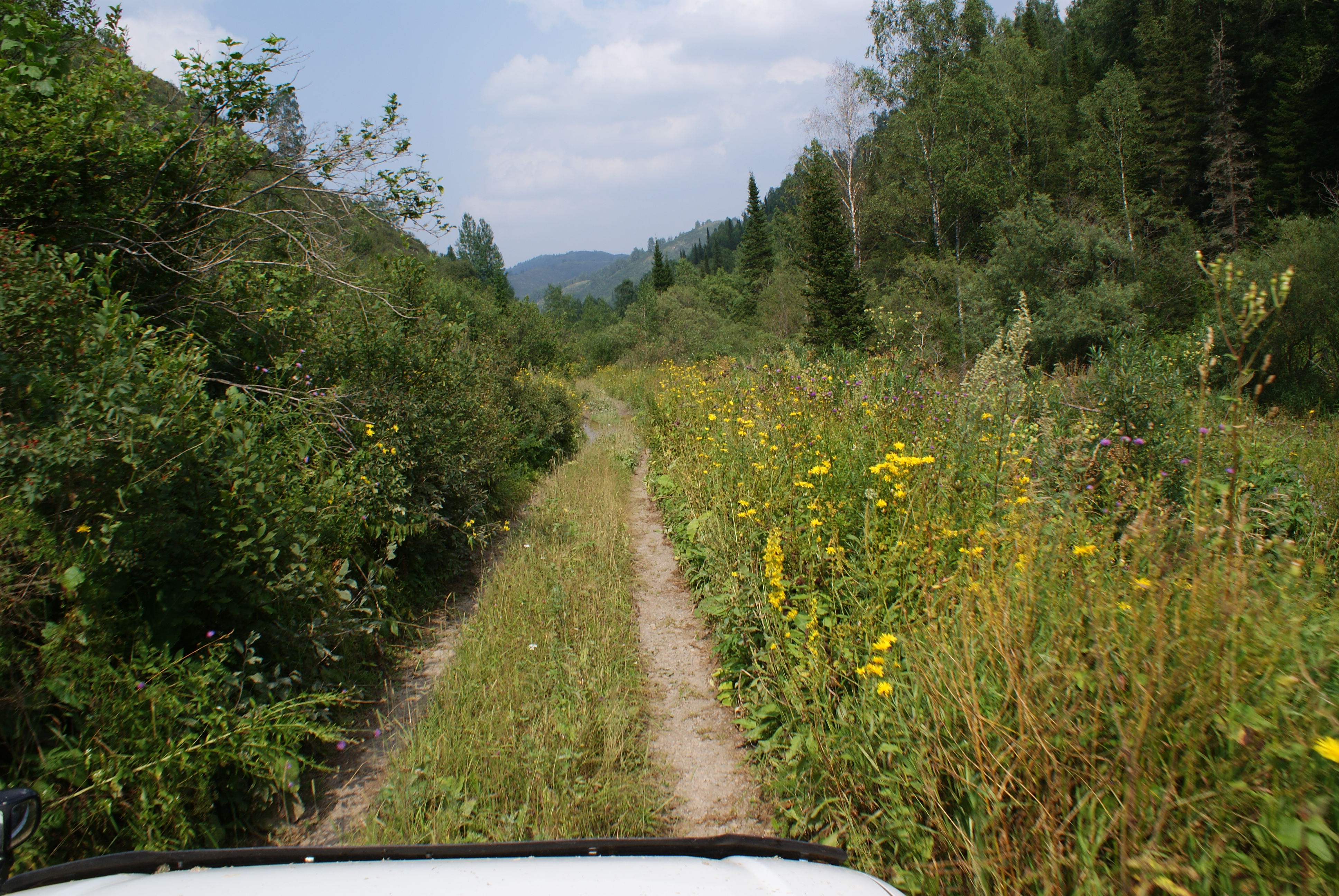 Низом на Бугрышиху